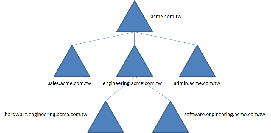 Active Directory 含子網域的網域樹範例。